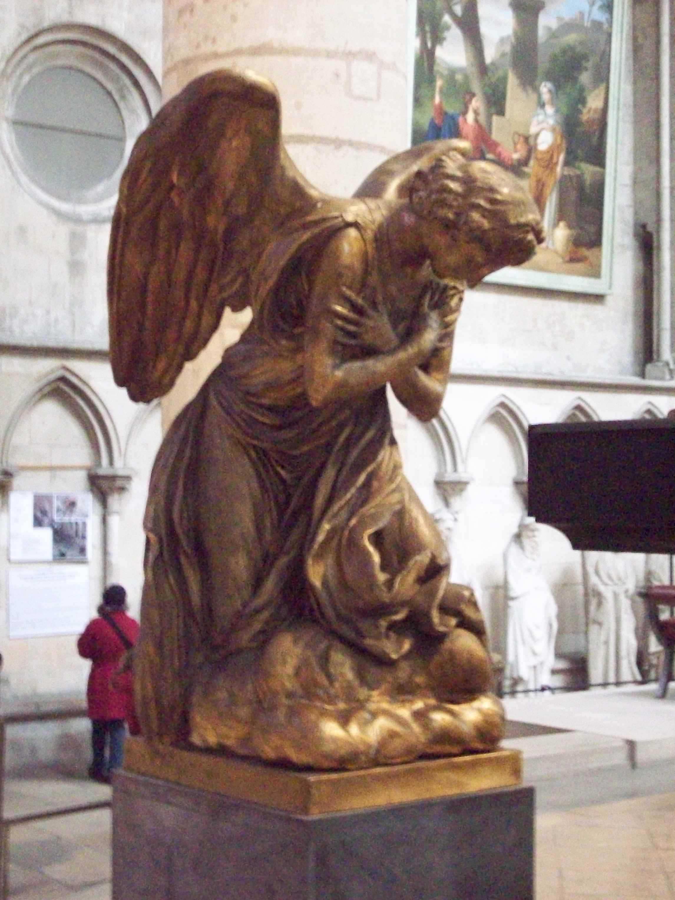 Ange de Caffieri dans le choeur de la cathédrale.